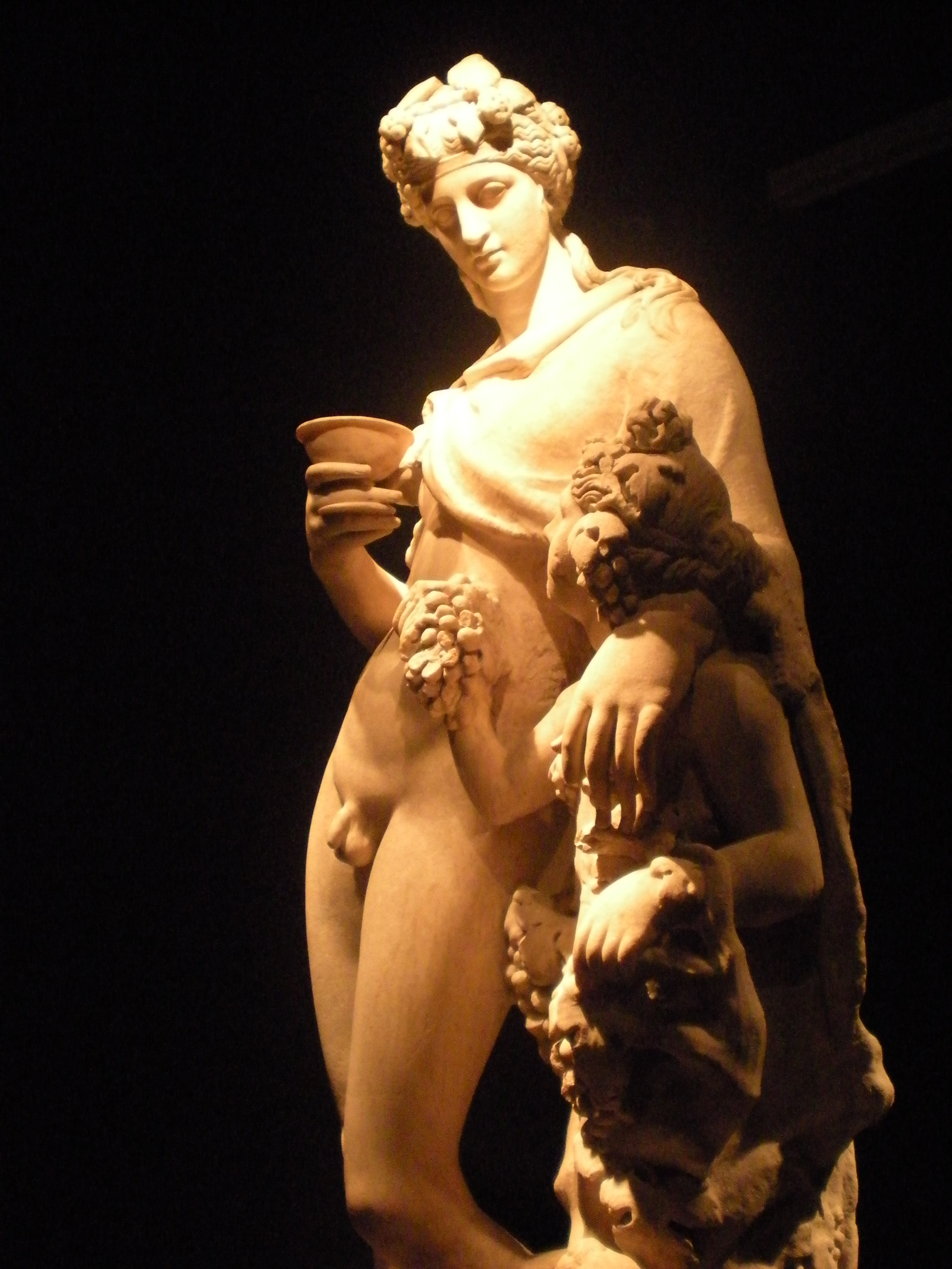 Estatua de mármol de Dionisio con una encarnación antropomorfa del vino, en la exposición La belleza del cuerpo, en el MARQ. Dinioso está representado como un joven afeminado que apoya el brazo izquierdo en el hombro de la encarnación del vino, como figura semihumana sobre la que crecen hojas y uvas. El cuerpo del dios del vino se modeló alargado y esbelto con suaves curvas femeninas, como formulismo tipológico de la época griega de la escultura tardía o «helenística». El brazo que sostiene la copa y otras pequeñas partes están restauradas. Época romana, aproximadamente del 150-200 d. C. Tal vez basada en un original griego del siglo II. a. C. Procedente de La Storta, Italia. Medidas: 1580 mm x 680 mm x 390 mm. GR 1805.0703.1 (Escultura 1636).